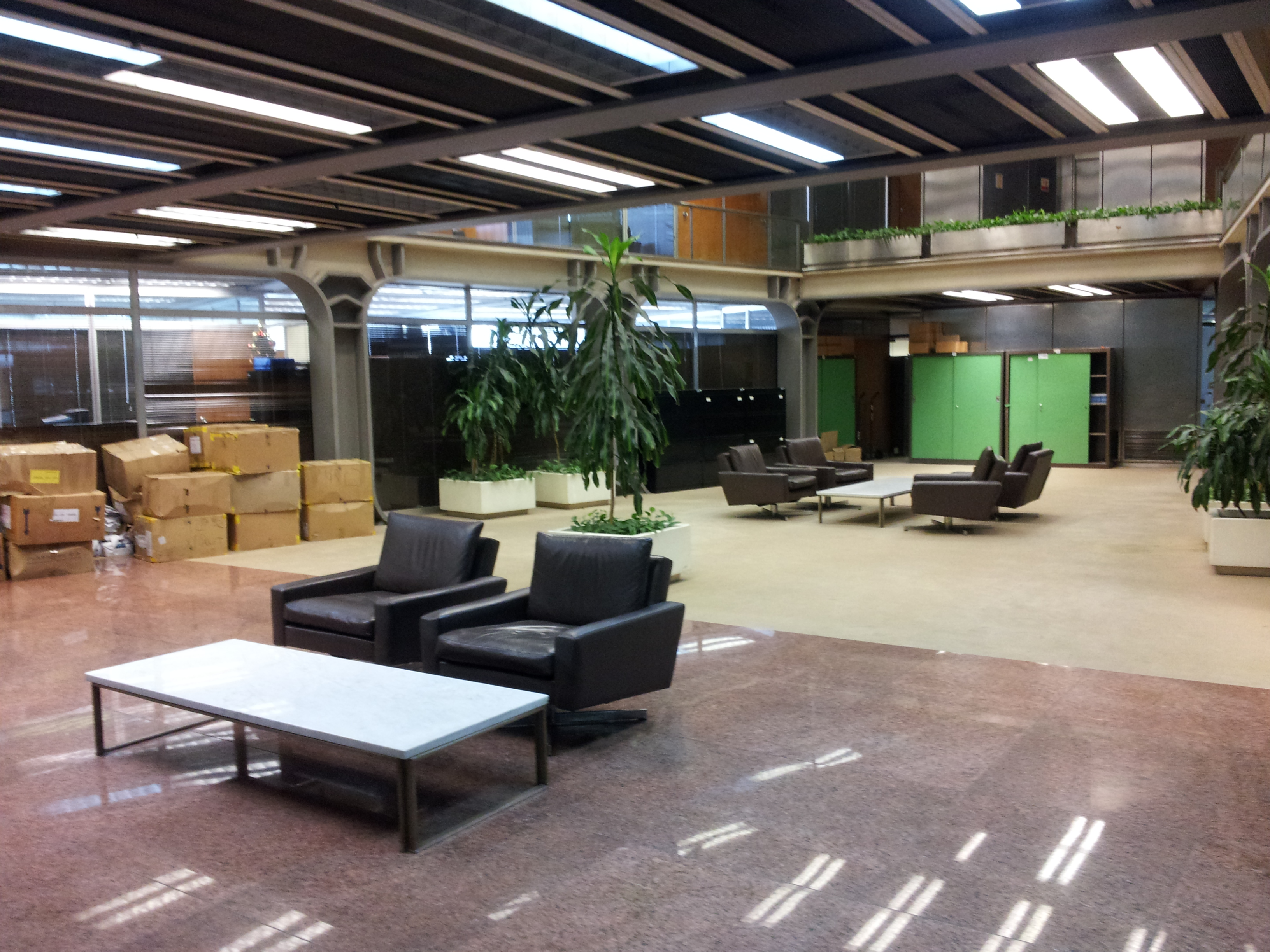 Lobby en el piso 10 del Edificio SOMISA, hoy sede de la Jefatura de Gabinete de Ministros de la Nación.